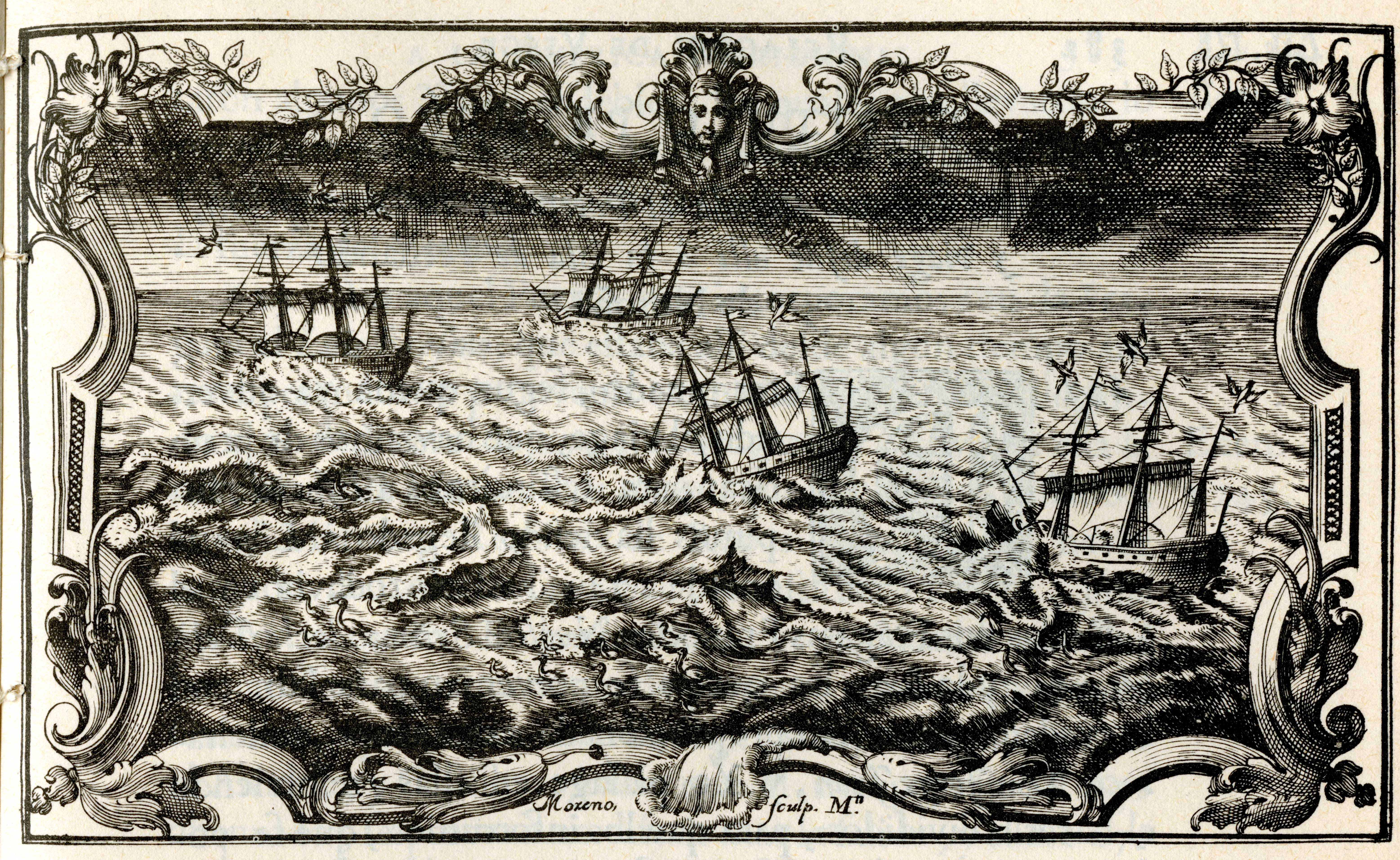 Imagen que recrea una imagen del Oceano Pacifico en 1744. De Ulloa, Antonio y Jorge Juan. Relación Histórica del Viaje a la América Meridional, hecho de Orden de Su Majestad Católica para medir algunos Grados de Meridiano Terrestre, y venir por ellos en conocimiento de la verdadera Figura y Magnitud de la Tierra, con otras varias Observaciones Astronómicas y Físicas. Por Don Jorge Juan Comendador de Aliaga, en la Orden de San Juan, Socio correspondiente de la Real Academia de las Ciencias de París y Don Antonio de Ulloa de la Real Sociedad de Londres: ambos Capitanes de Fragata de la Real Armada. Segunda Parte / Tomo II. Impresa por la Orden del Rey Nuestro Señor en Madrid por Antonio Marín, Año de MCDDXLVIII (1748). Diapositiva de Consulta y acceso publico cuya información fue investigada de un libro y/o ejemplar de revisión custodiado en los Fondos Bibliográficos (Sección Siglo XVIII o Etapa Colonial) del Archivo Histórico del Guayas; Guayaquil, Ecuador